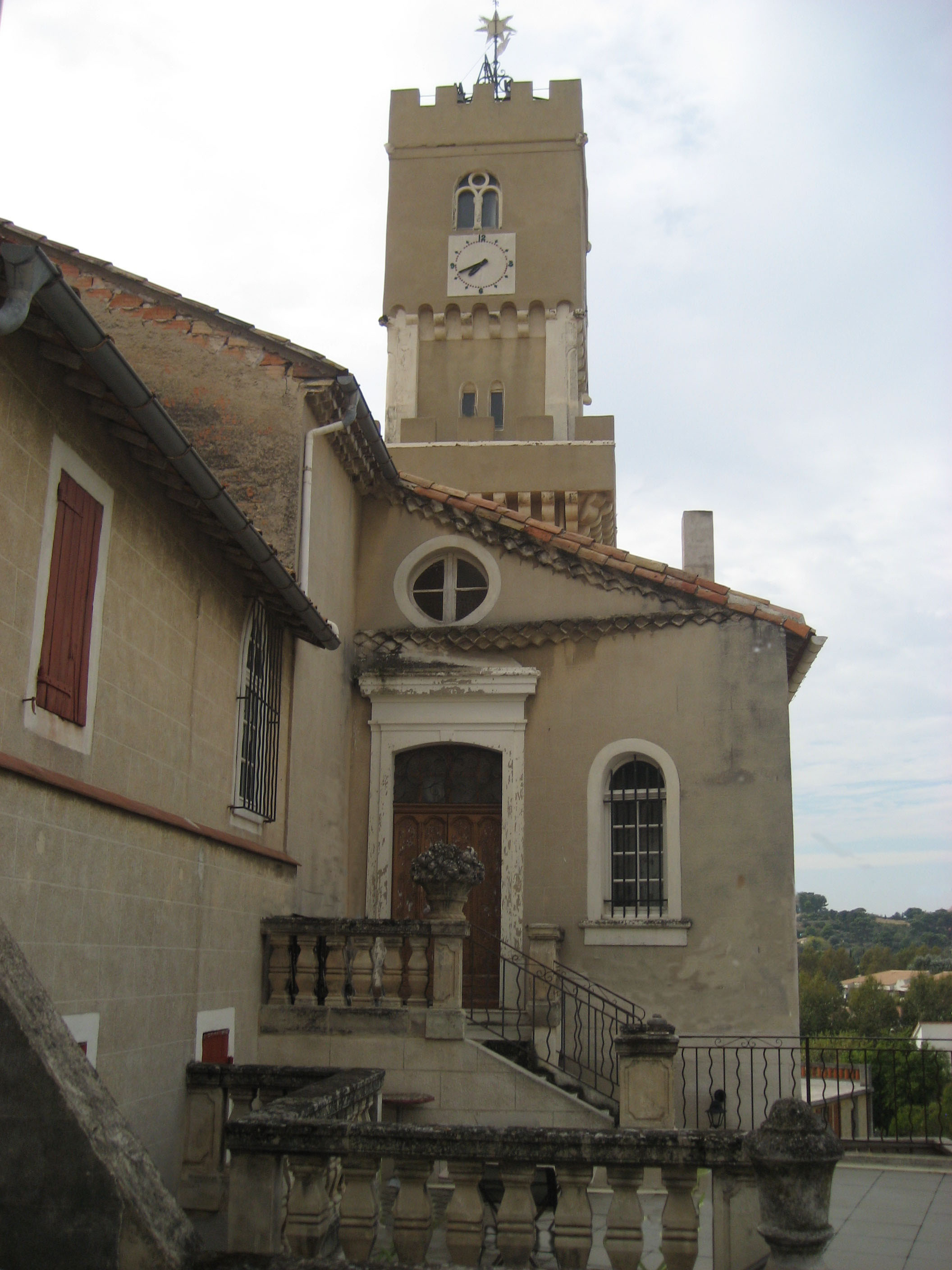 Porte d'honneur du château de Château Gombert, Musée du Terroir Marseillais